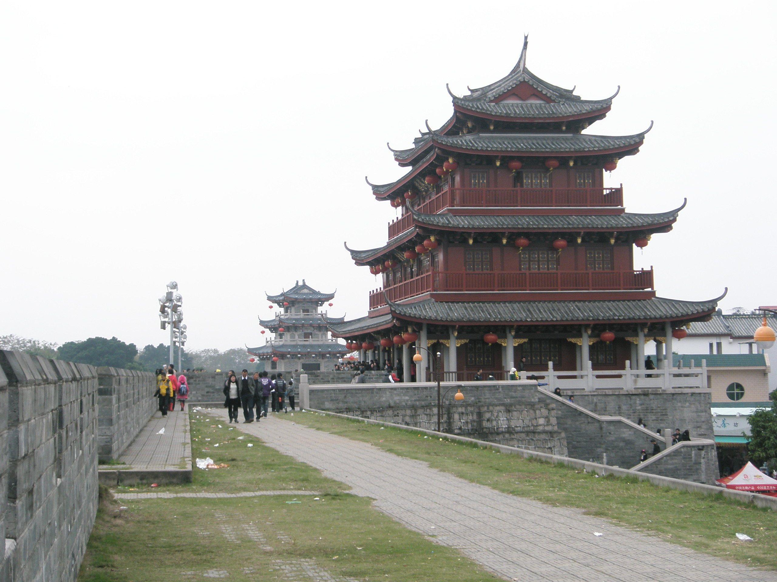 从城墙仰拍广济楼